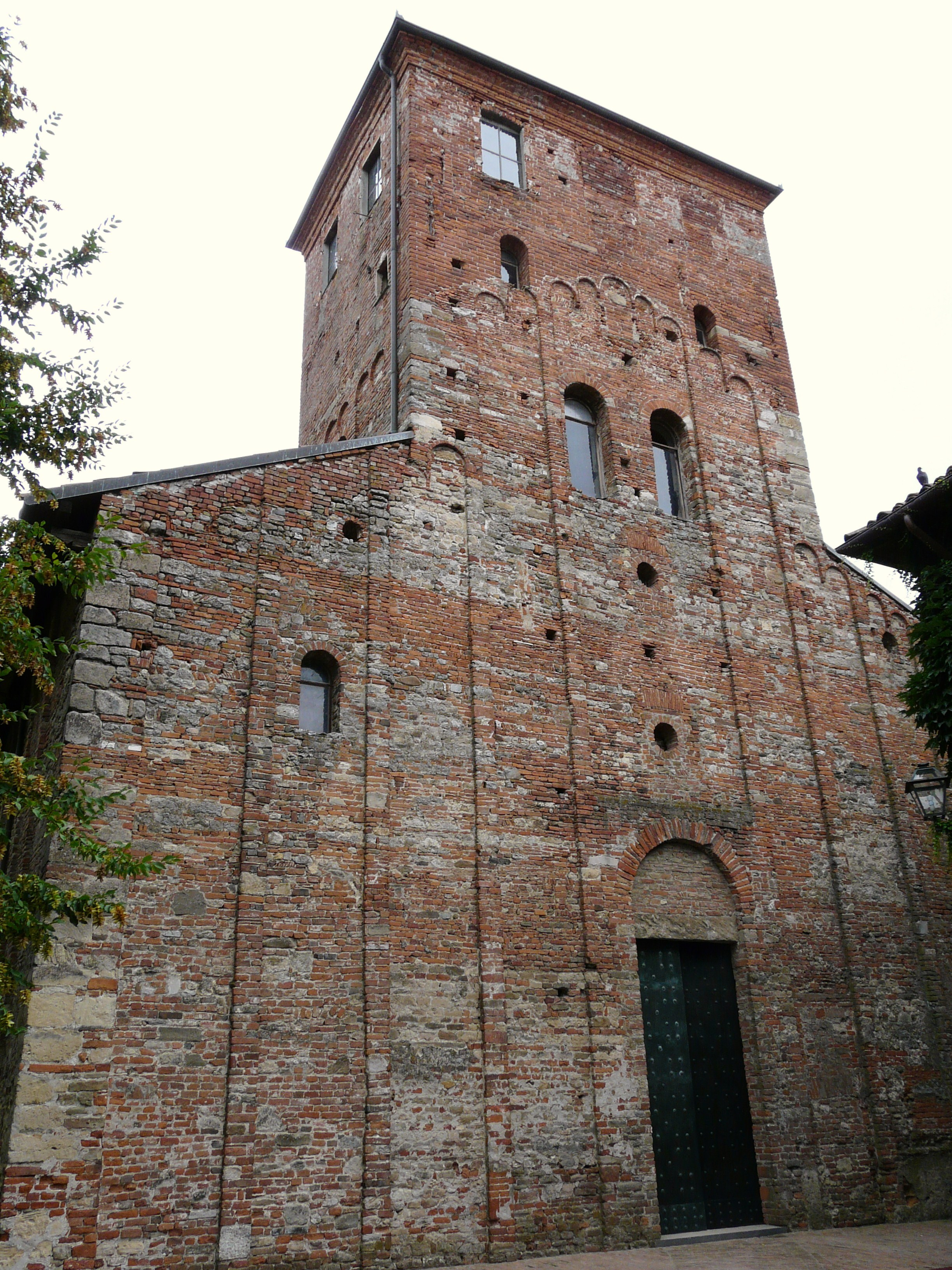 Abbazia di Santa Giustina di Sezzadio, Piemonte, Italia